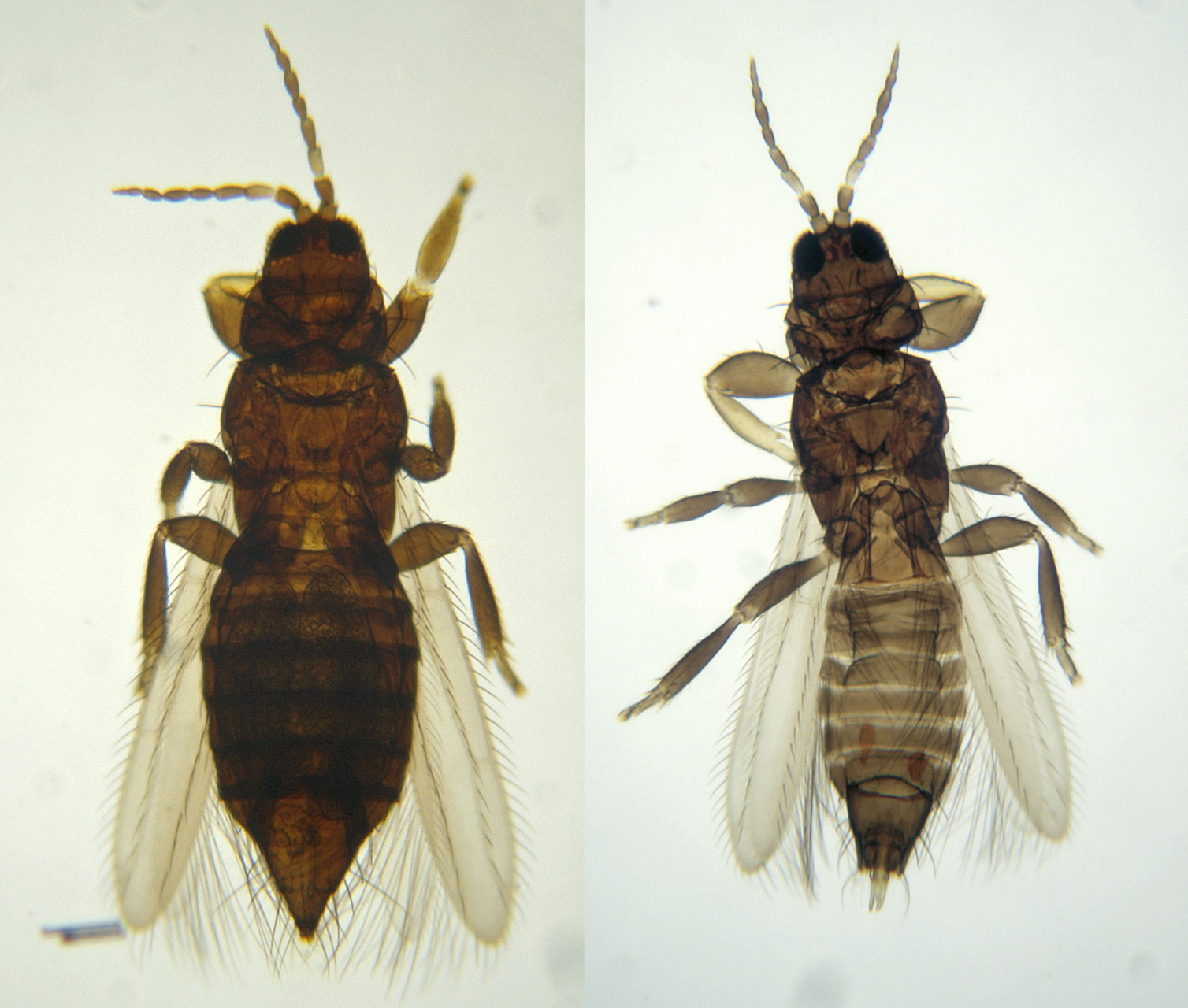 Thysanoptera; hembra, izda. y macho, dcha., seguramente de la misma especie. Arganda del Rey, Madrid.